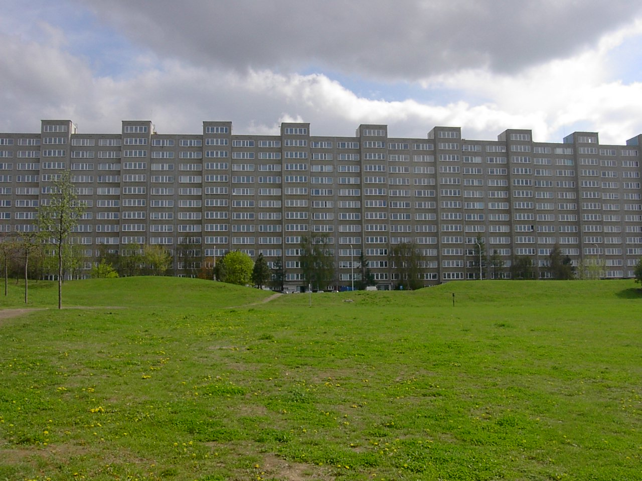 Neuvěřitelně dlouhý panelák v Křejpského ulici na Jižním Městě I.